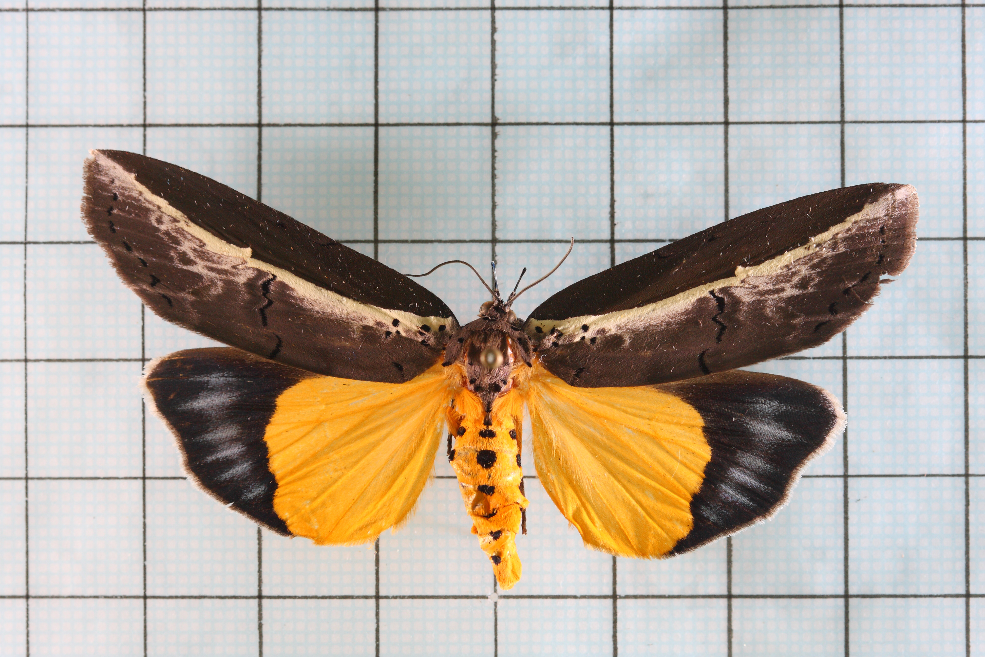 Eligma narcissus (Cramer, 1775) 認識台灣的昆蟲 8 夜蛾科:P.305